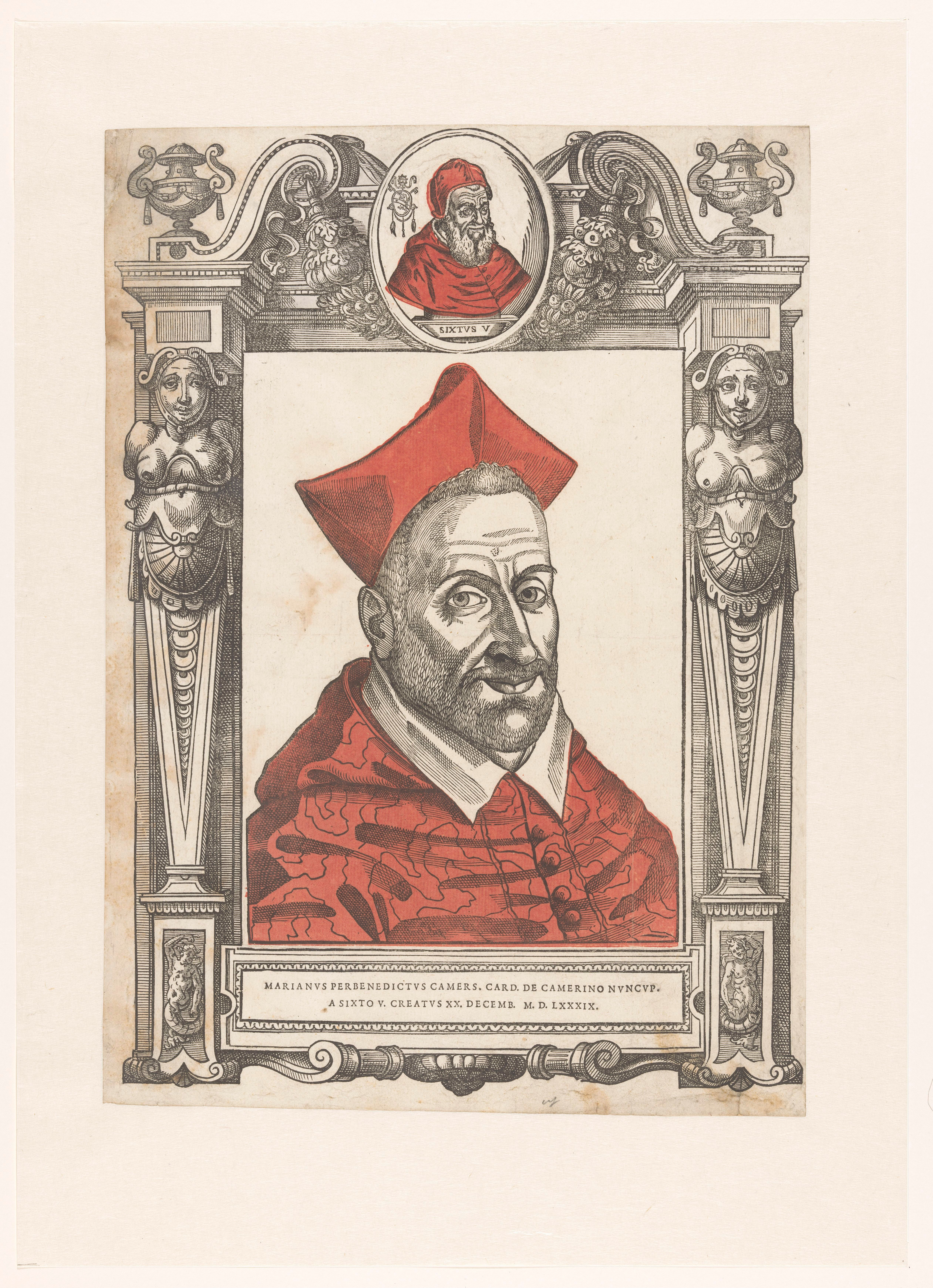 IdentificatieTitel(s): Portret van kardinaal Mariano PierbenedettiObjecttype: prent Objectnummer: RP-P-2009-22Opschriften / Merken: verzamelaarsmerk, verso, gestempeld: Lugt 2228verzamelaarsmerk, verso, gestempeld: Lugt 2760Omschrijving: Portret van Mariano Pierbenedetti, gevat in een omlijsting in de vorm van een tabernakel. Midden boven in een medaillon het portret van paus Sixtus V.VervaardigingVervaardiger: prentmaker: Leonardo Parasole (toegeschreven aan)Plaats vervaardiging: ItaliëDatering: 1590 - 1600Fysieke kenmerken: Houtsnede met sjabloon gekleurd in roodMateriaal: papier Techniek: houtsnede / met de hand kleurenAfmetingen: blad: h 426 mm × b 304 mmOnderwerpWat: tabernacle ~ altarhistorical personspopecardinalWie: Mariano PierbenedettiSixtus VVerwerving en rechtenCredit line: Aankoop uit het F.G. Waller-FondsVerwerving: aankoop 9-mar-2009Copyright: Publiek domein